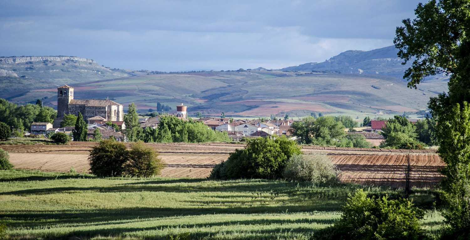 Panorámica de Sotresgudo. Vista desde el sur.